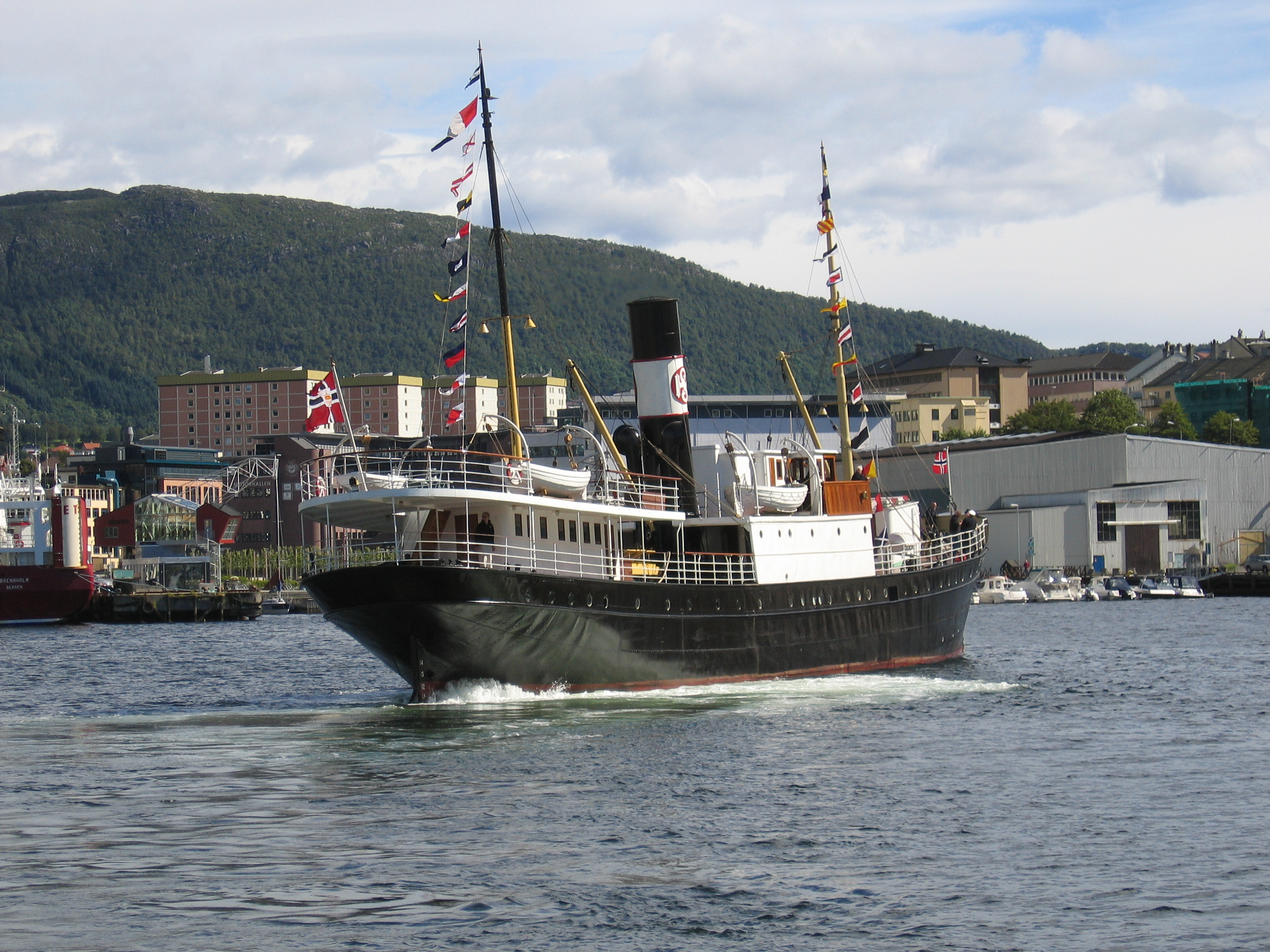 SS «Stord 1» in Bergen harbour, Norway August 2005.